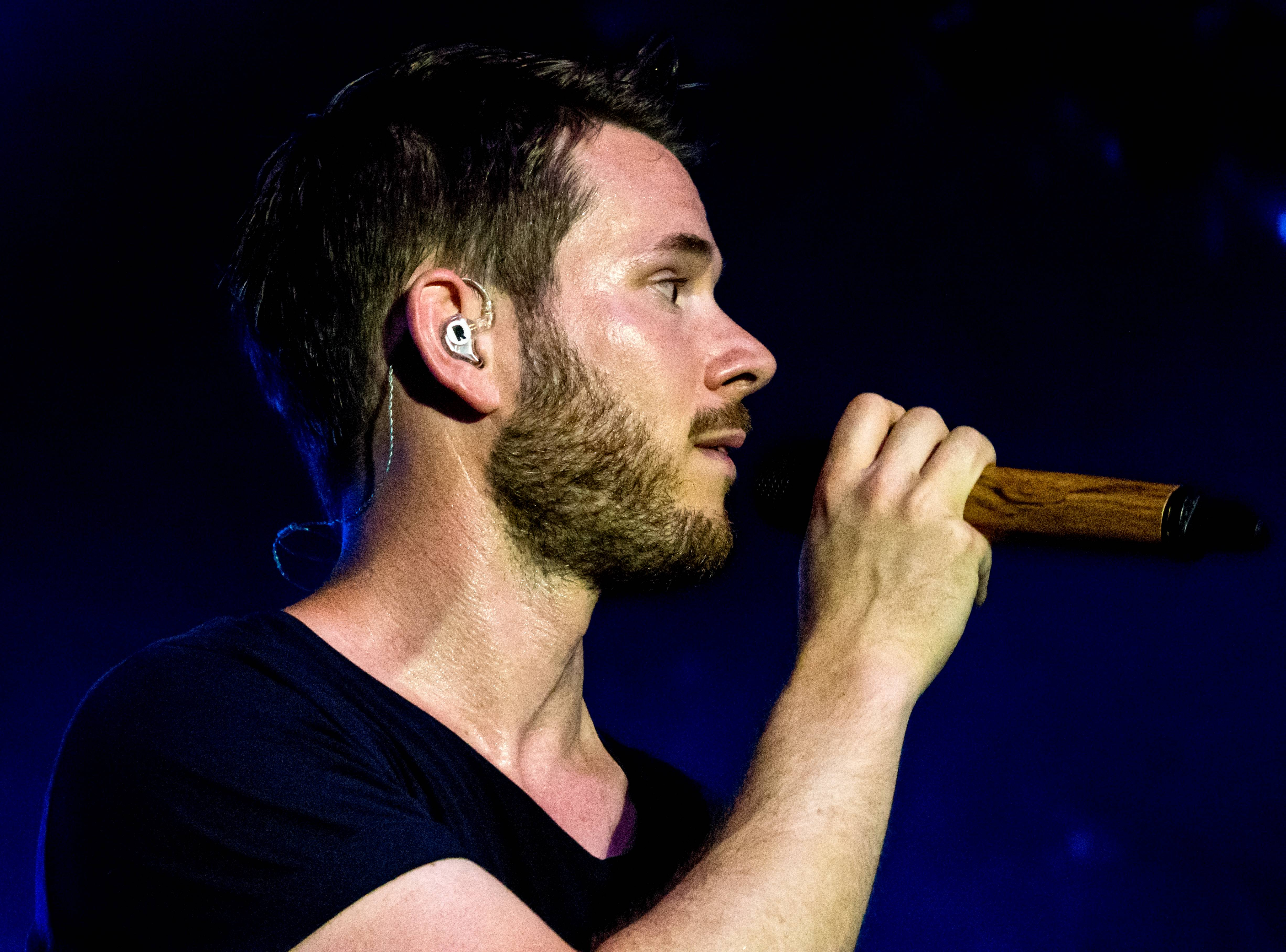 Bilder vom ZMF 2015 Revolverheld im Zirkuszelt